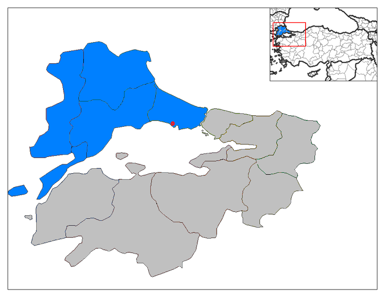 Източна Тракия на картата на Мармара, Турция